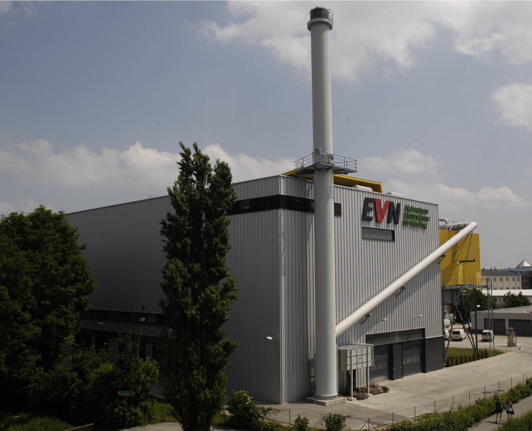 Biomasseheizkraftwerk Mödling von NordWest der EVN Wärme